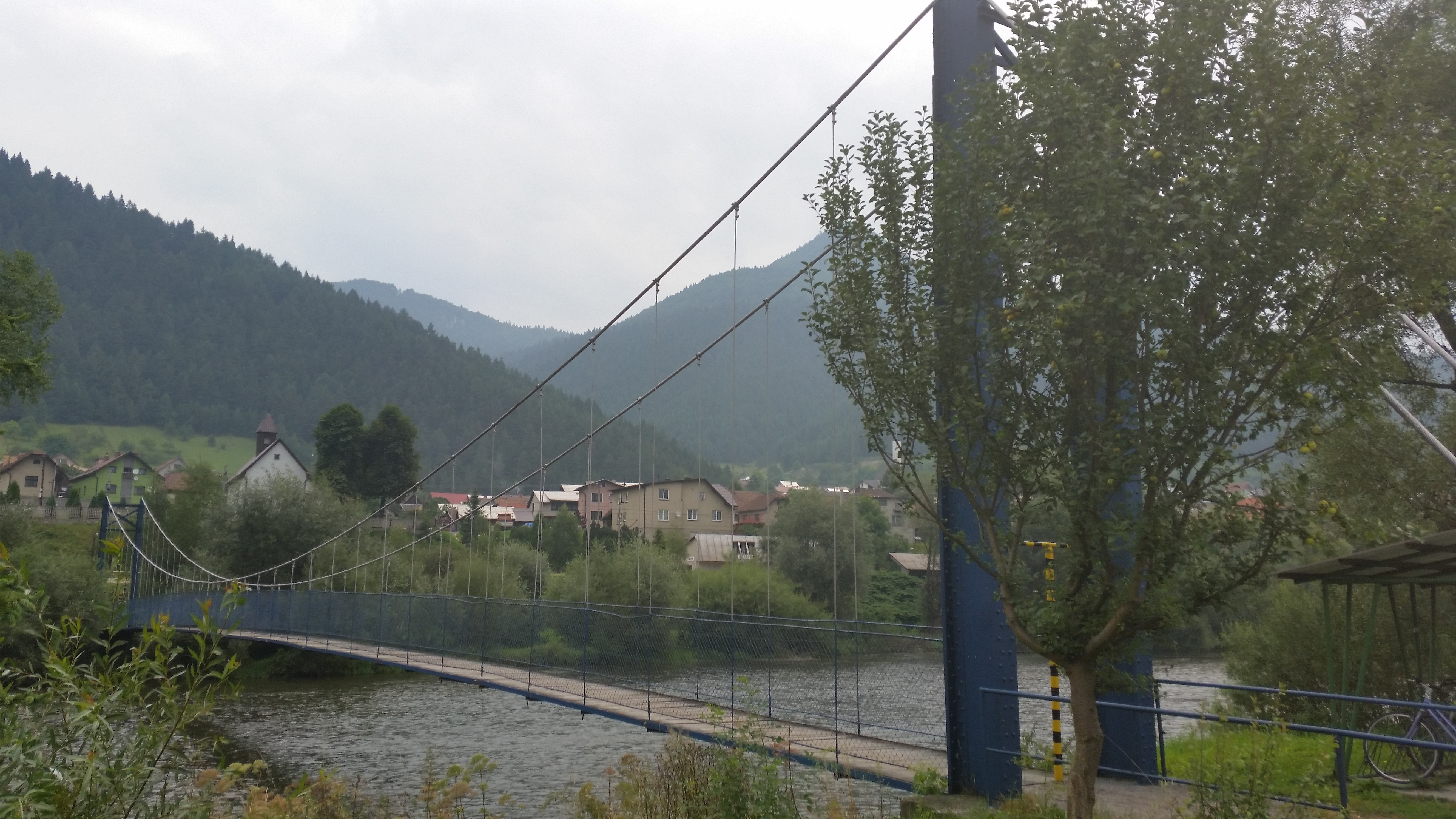 Visutá lávka medzi Švošovom a Hubovou